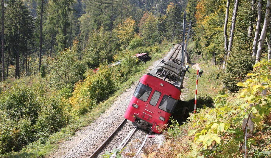 Entgleister Pendelzug der TRAVYS oberhalb von Baulmes. Der Steuerwagen liegt unterhalb des Bahntrasses.